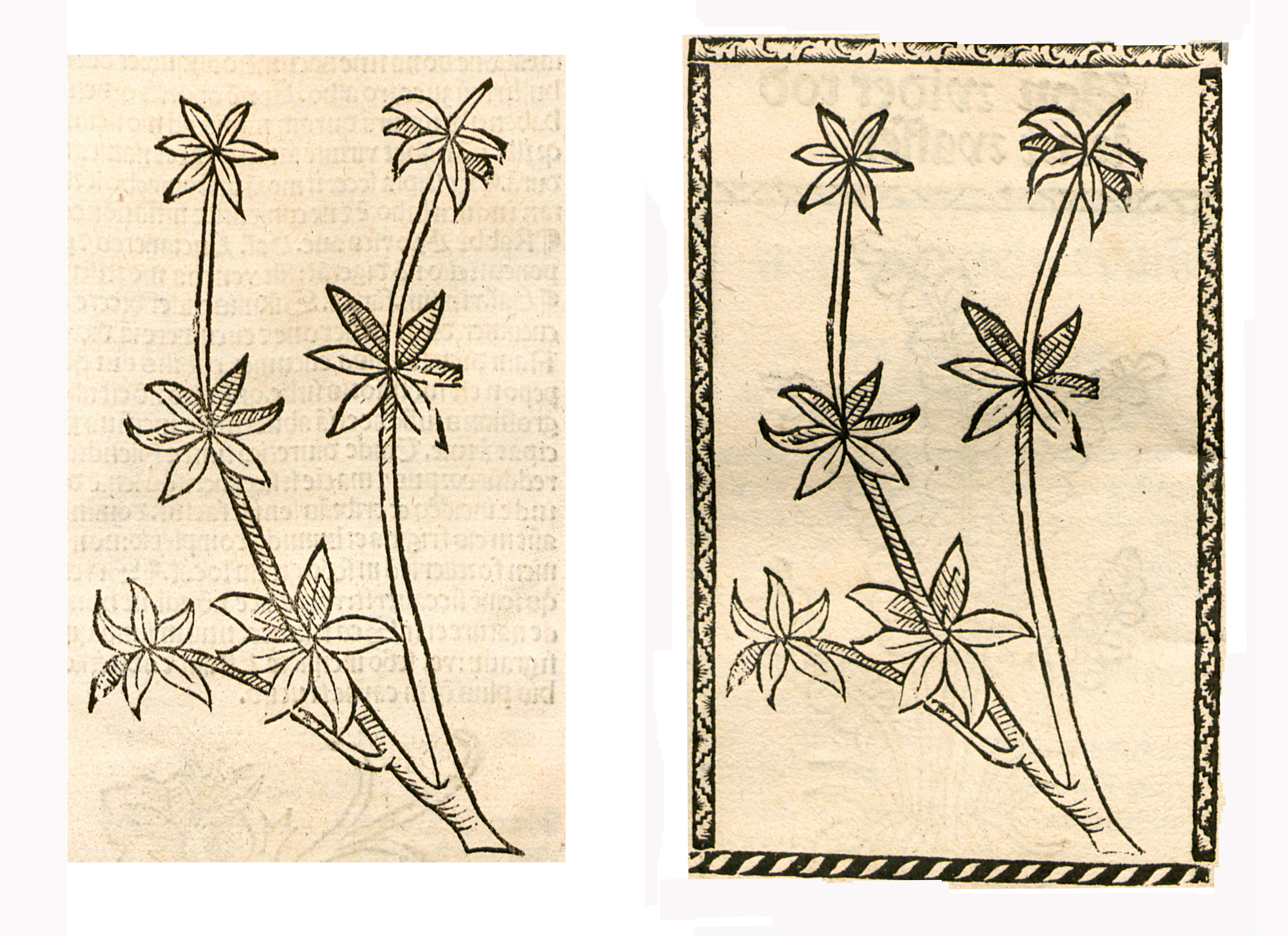 Abbildung von: Walt Meister (Galium odoratum)